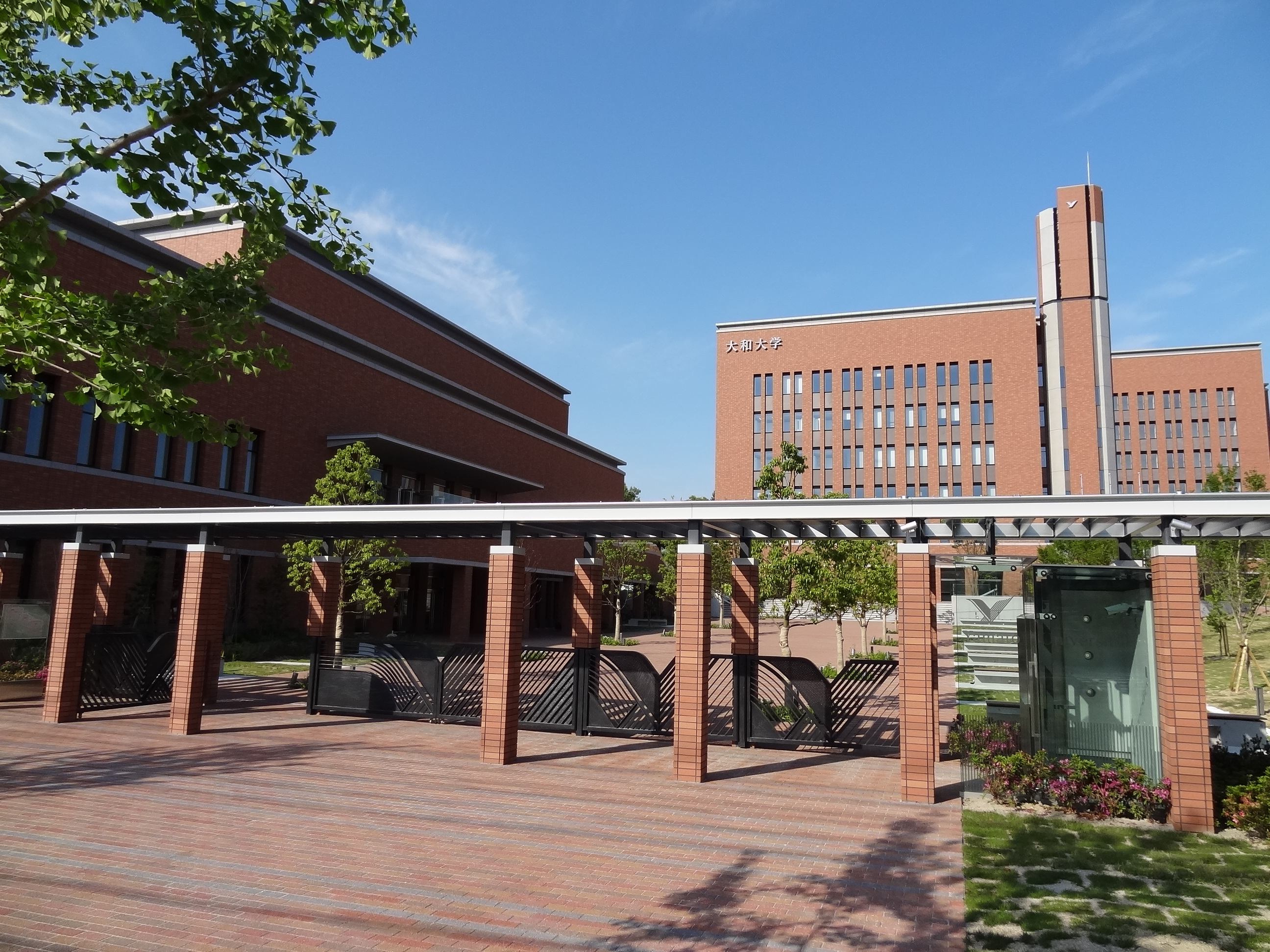 大和大学の正門前広場から学舎を撮影。正門右手のガラス張りブースは守衛所。